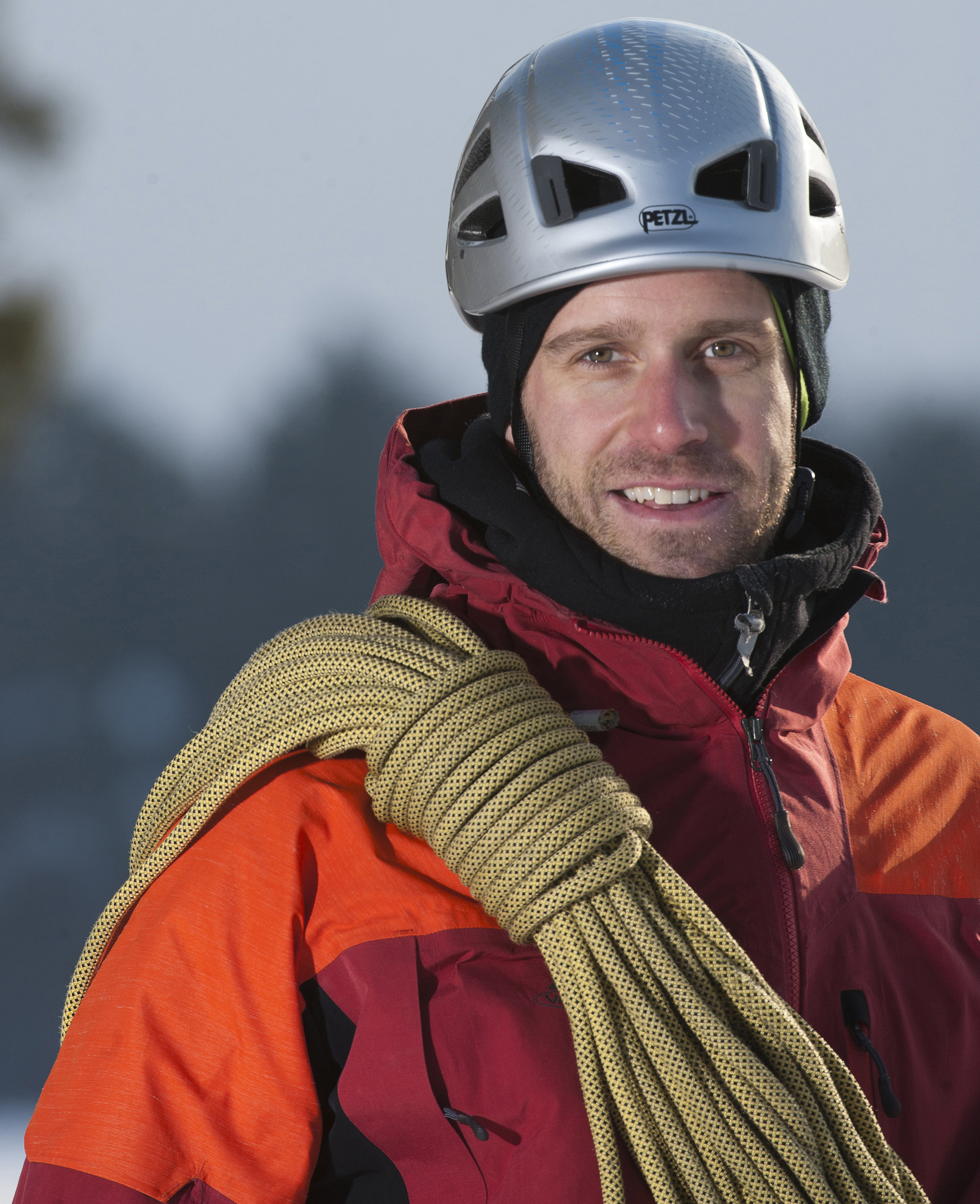 Svenska äventyraren/föreläsaren och dokumentärfilmaren Fredrik Sträng photocredit: Fredrik Schlyter